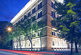 CIECH-HQ-UP